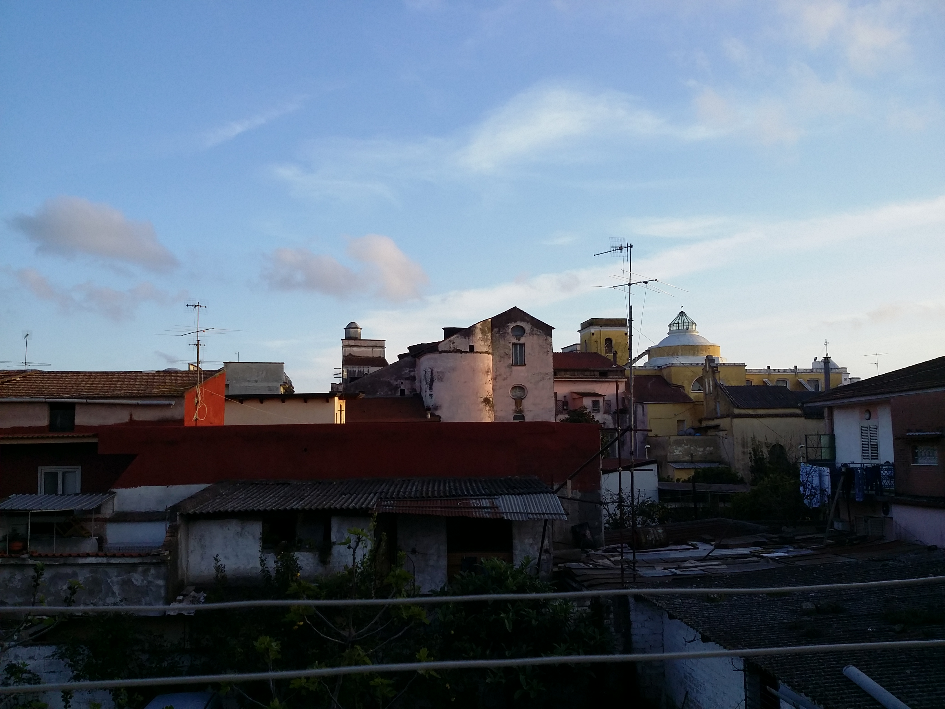 Chiesa San Cesario